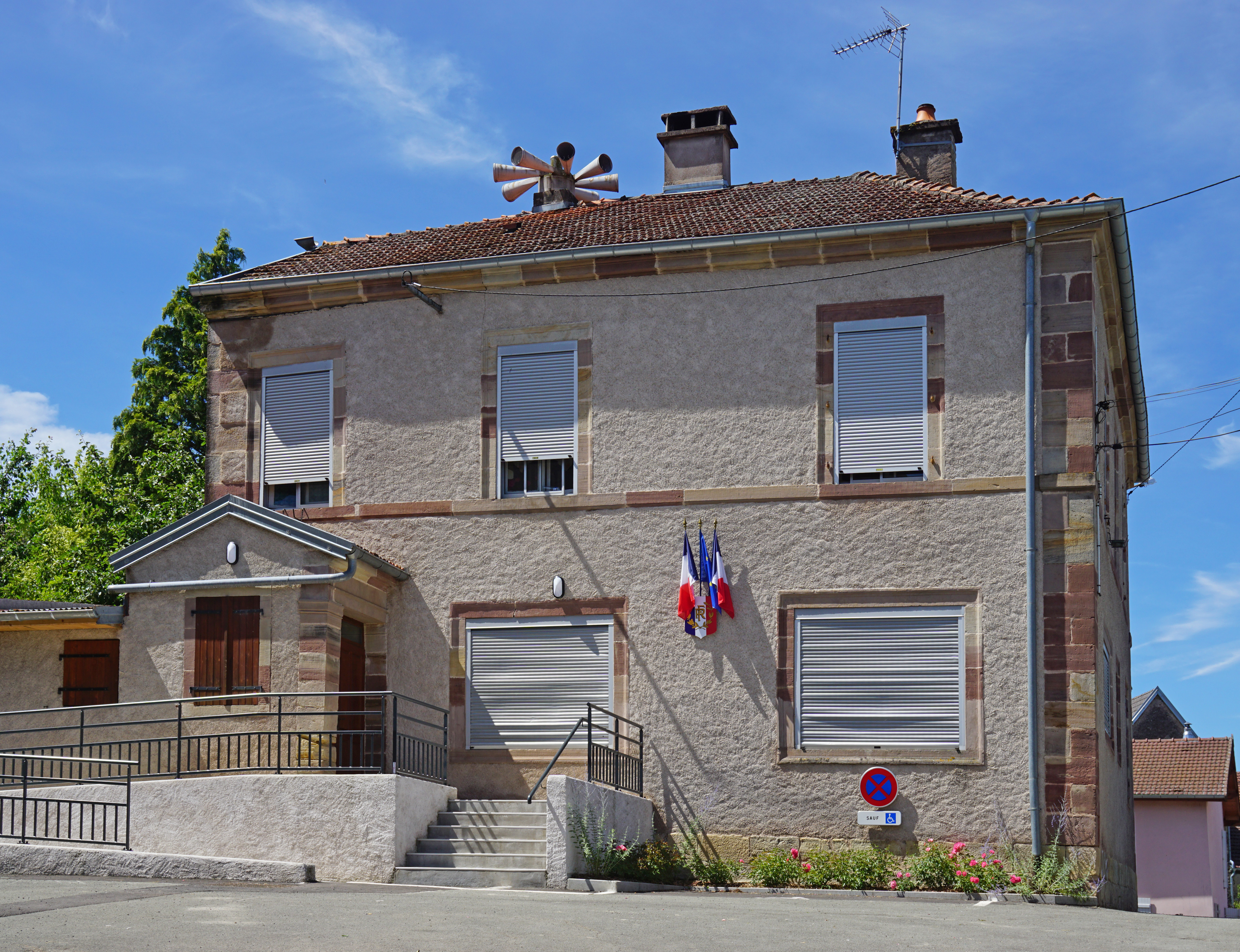 Mairie de Villers-lès-Luxeuil.